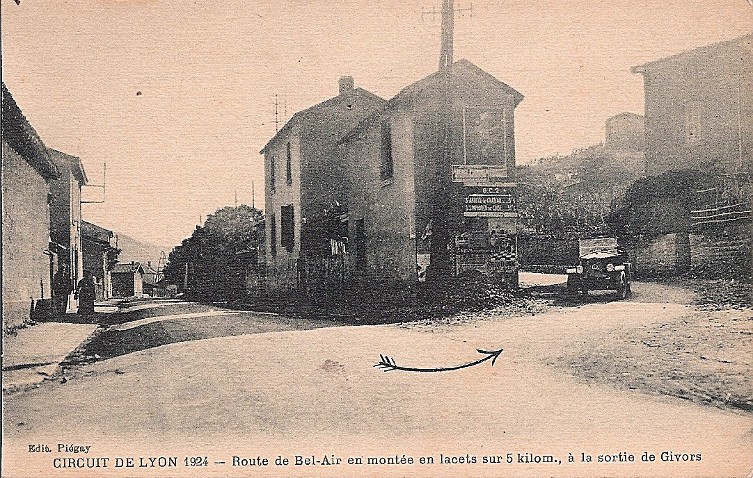 Circuit de Lyon 1924 - Bas de Montrond